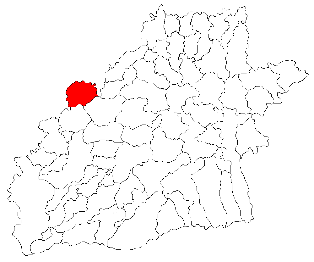 Categorie:Hărţi ale judeţului Sibiu